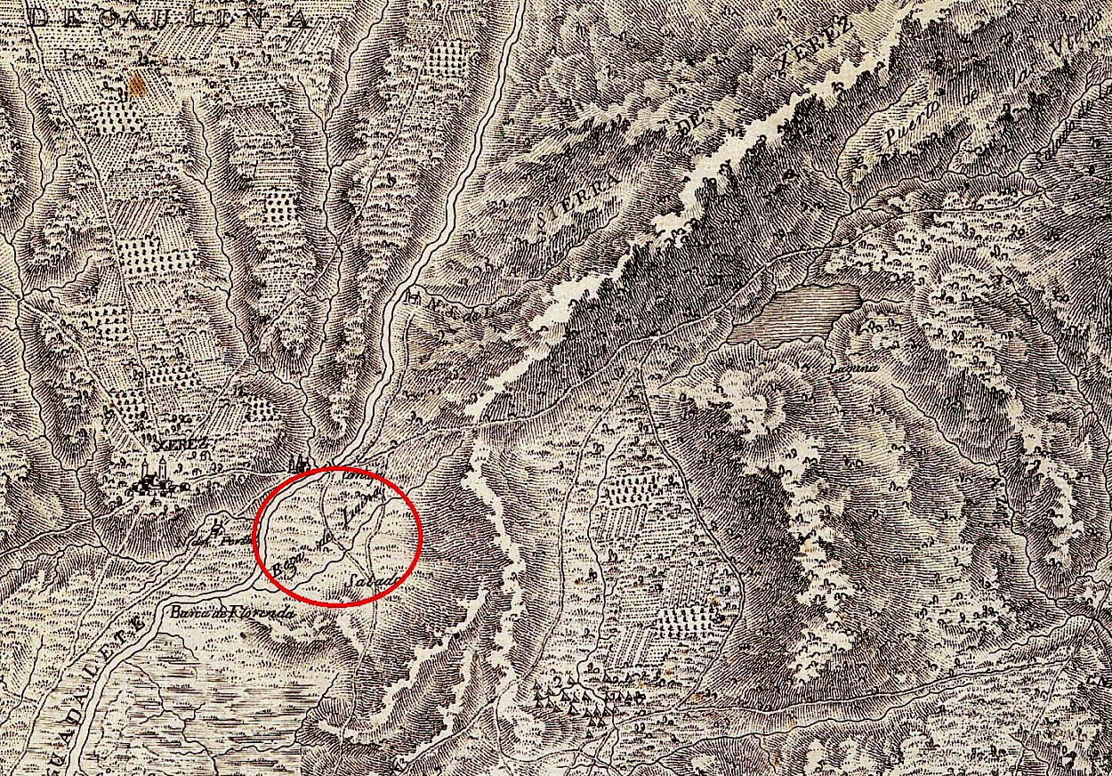 Mapa de José Cardano 1809 (destacada la zona de La Ina)